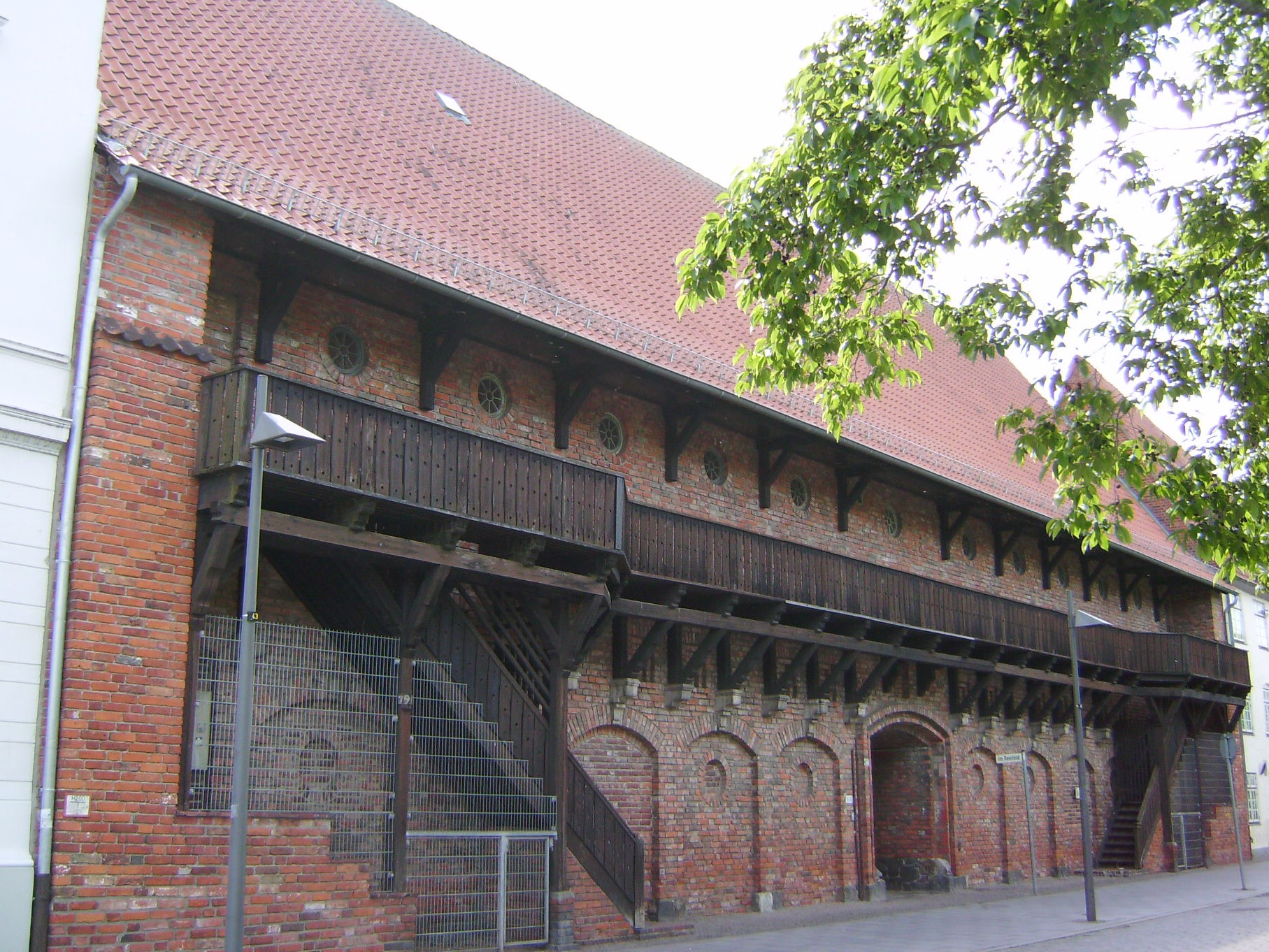 Bunker An der Obertrave in Lübeck